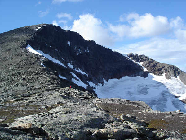 Mohtseretjåhkes branta östsida med Tärnaglaciären.